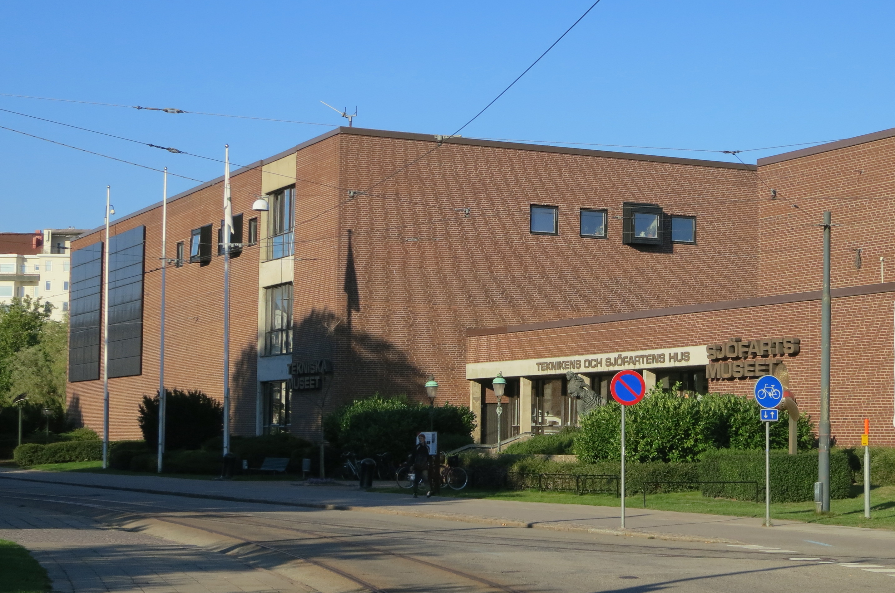 Teknikens och sjöfartens hus i Malmö, september 2013